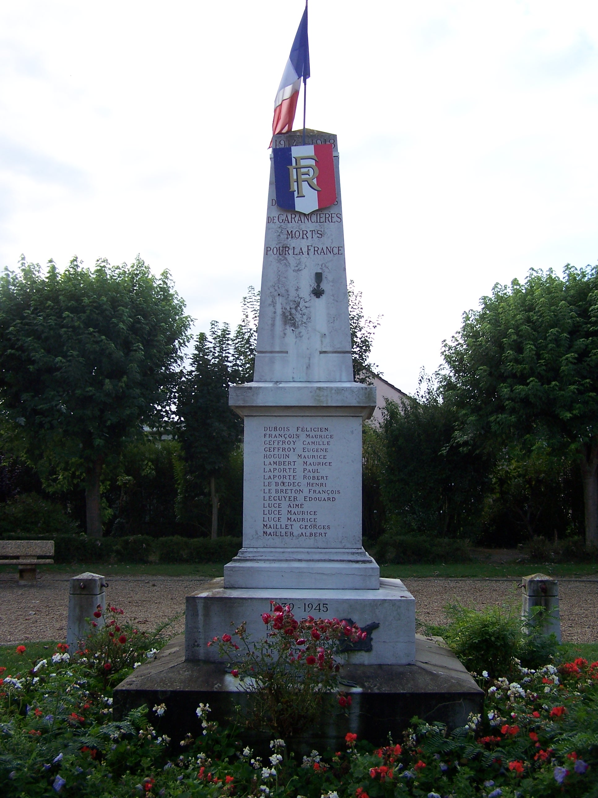 Monument aux morts de Garancières (Yvelines, France)